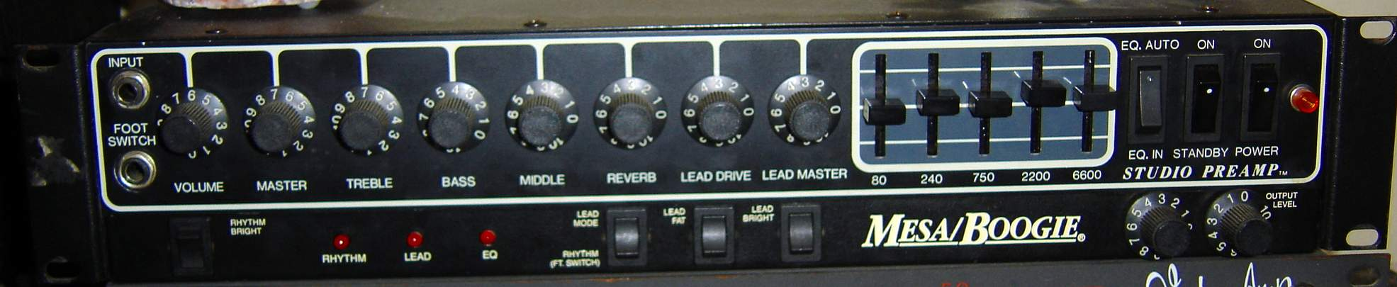 Mein Mesa/Boogie StudioPre